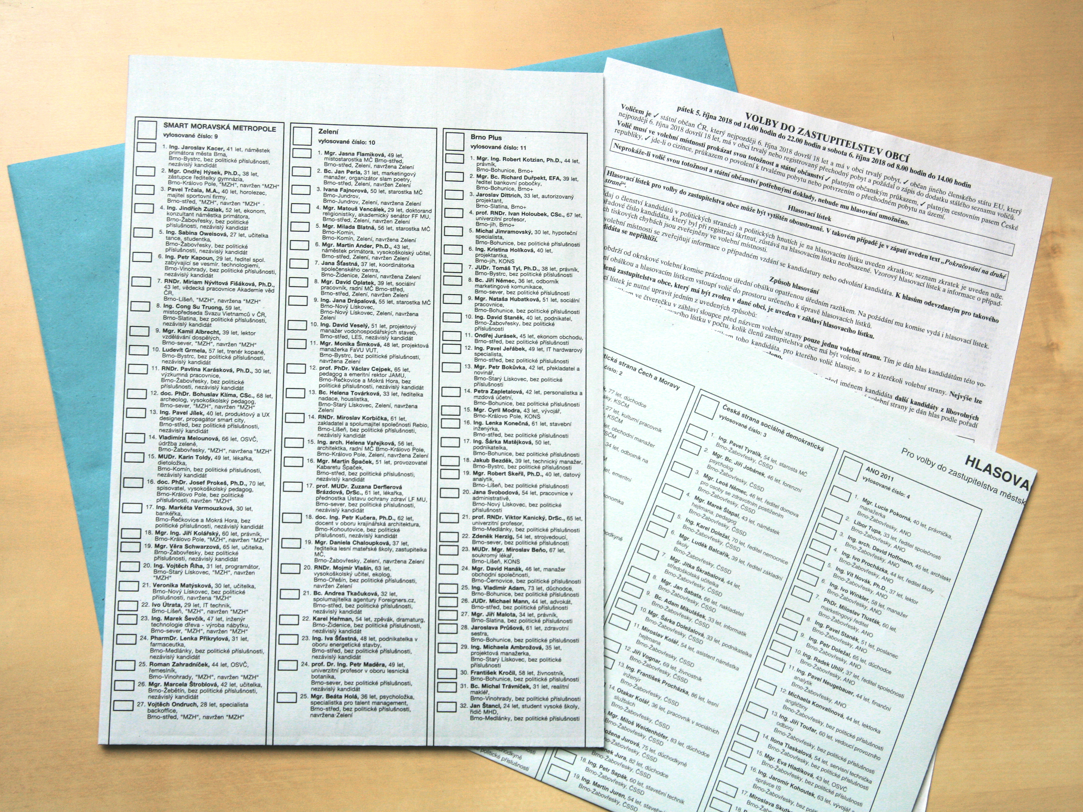 Obálka s hlasovacími lístky pro komunální volby v říjnu 2018, verze pro statutární město Brno a jeho městskou část.